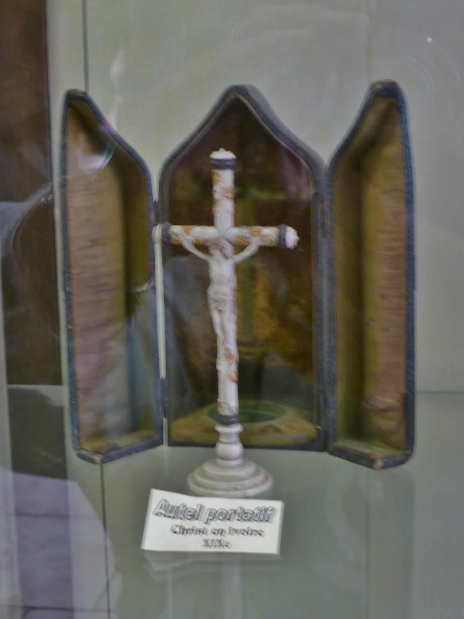 Autel portatif; Christ en ivoire, 19e siècle; Le Musée des Arts et Traditions populaires, Joseph Vaylet; Espalion, dept. Aveyron, France